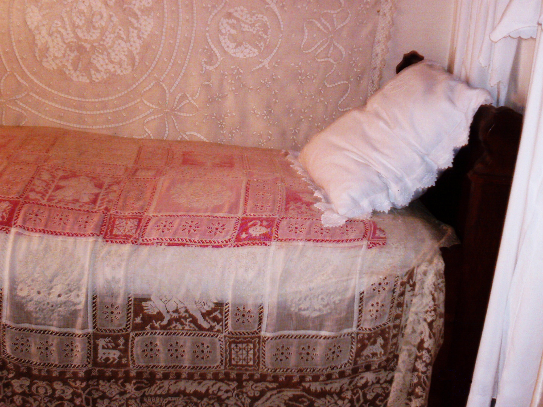 Dessus de lit ajouré et brodé, musée de la broderie Fontenoy